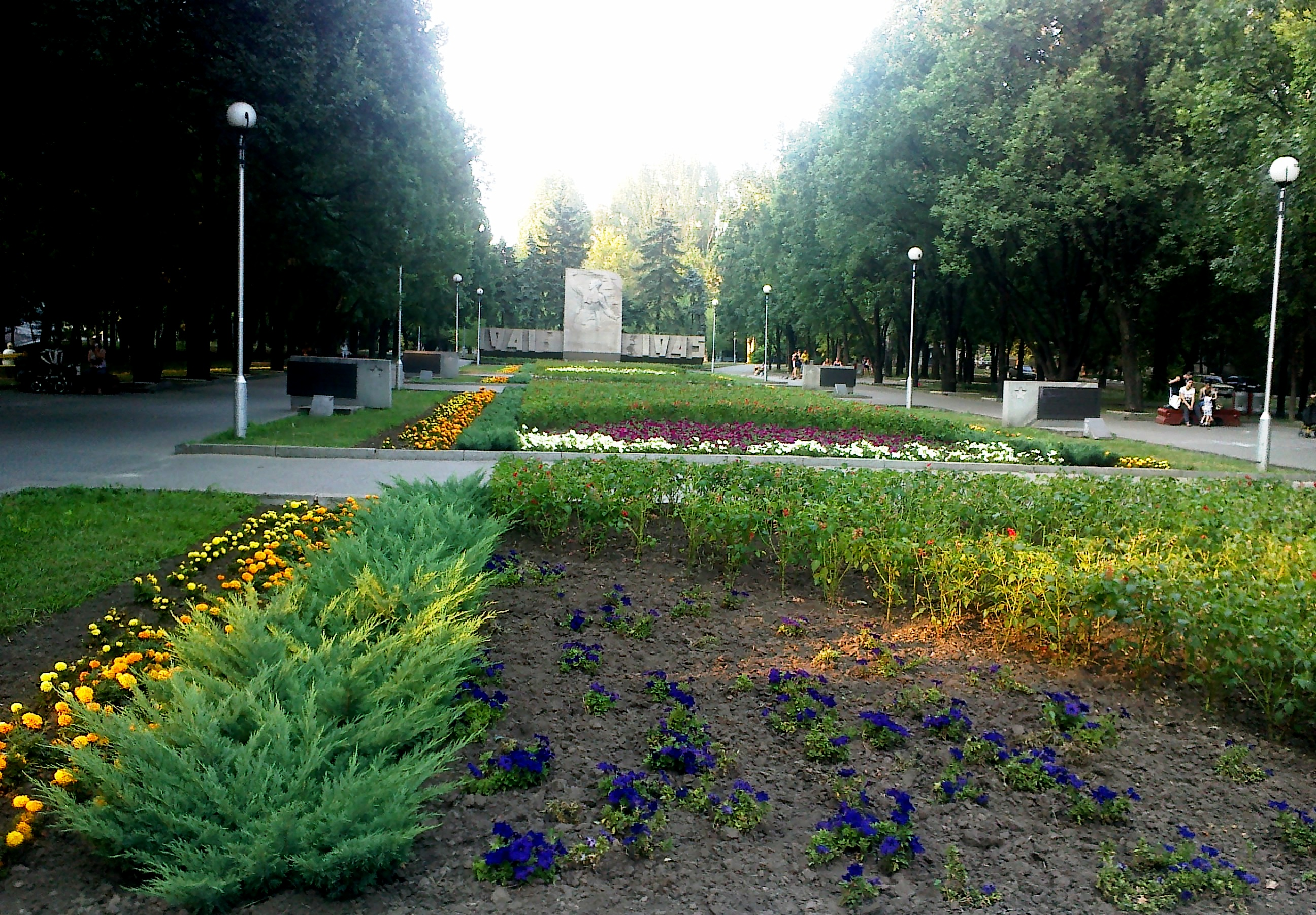 Алея Слави, Запоріжжя, пр. Леніна / вул. 40 - річчя Радянської України